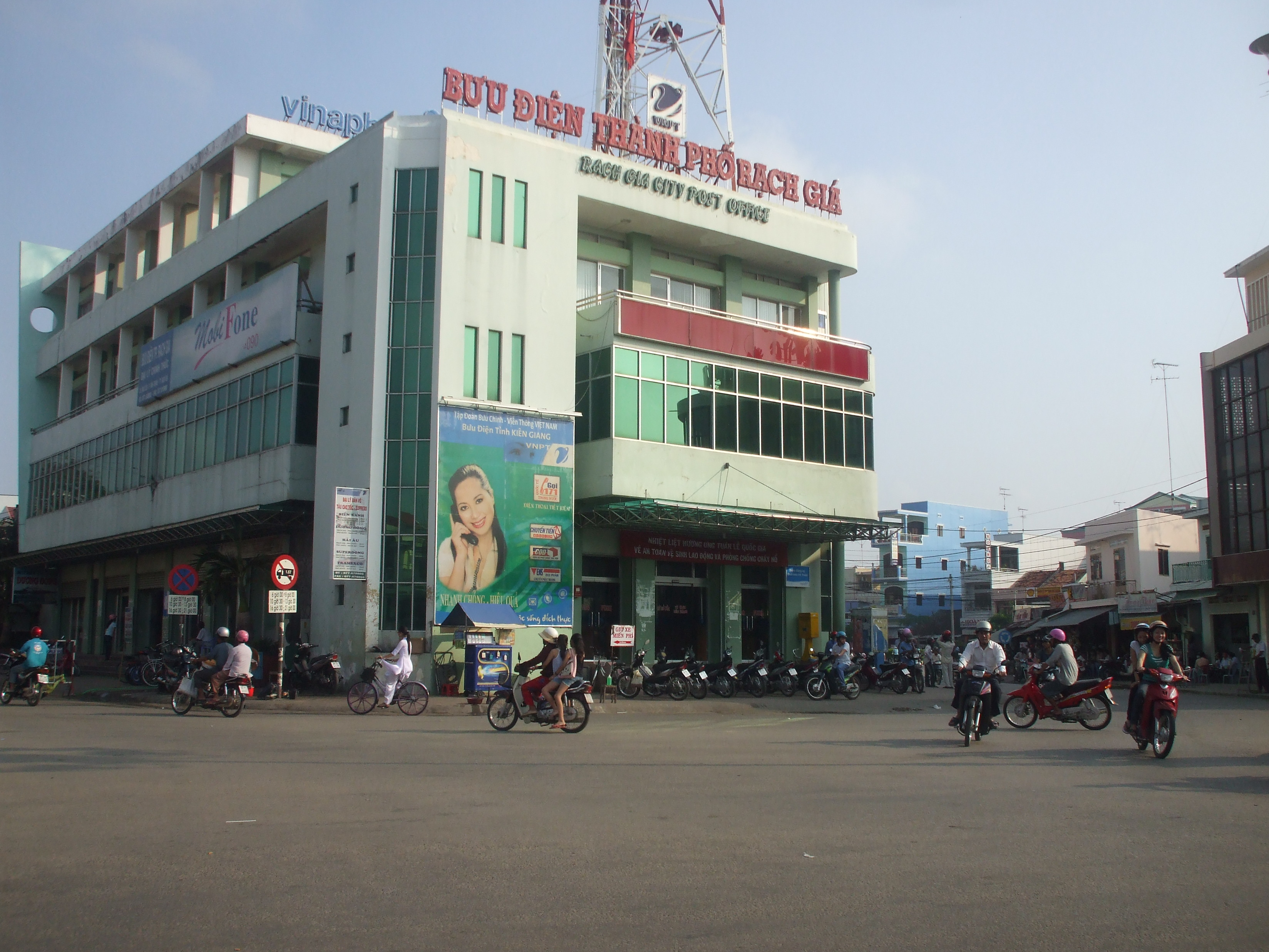 Nơi Nguyễn Trung Trực thọ án, nay là Bưu điện Thành phố Rạch Giá (Rạch Giá, Kiên Giang).